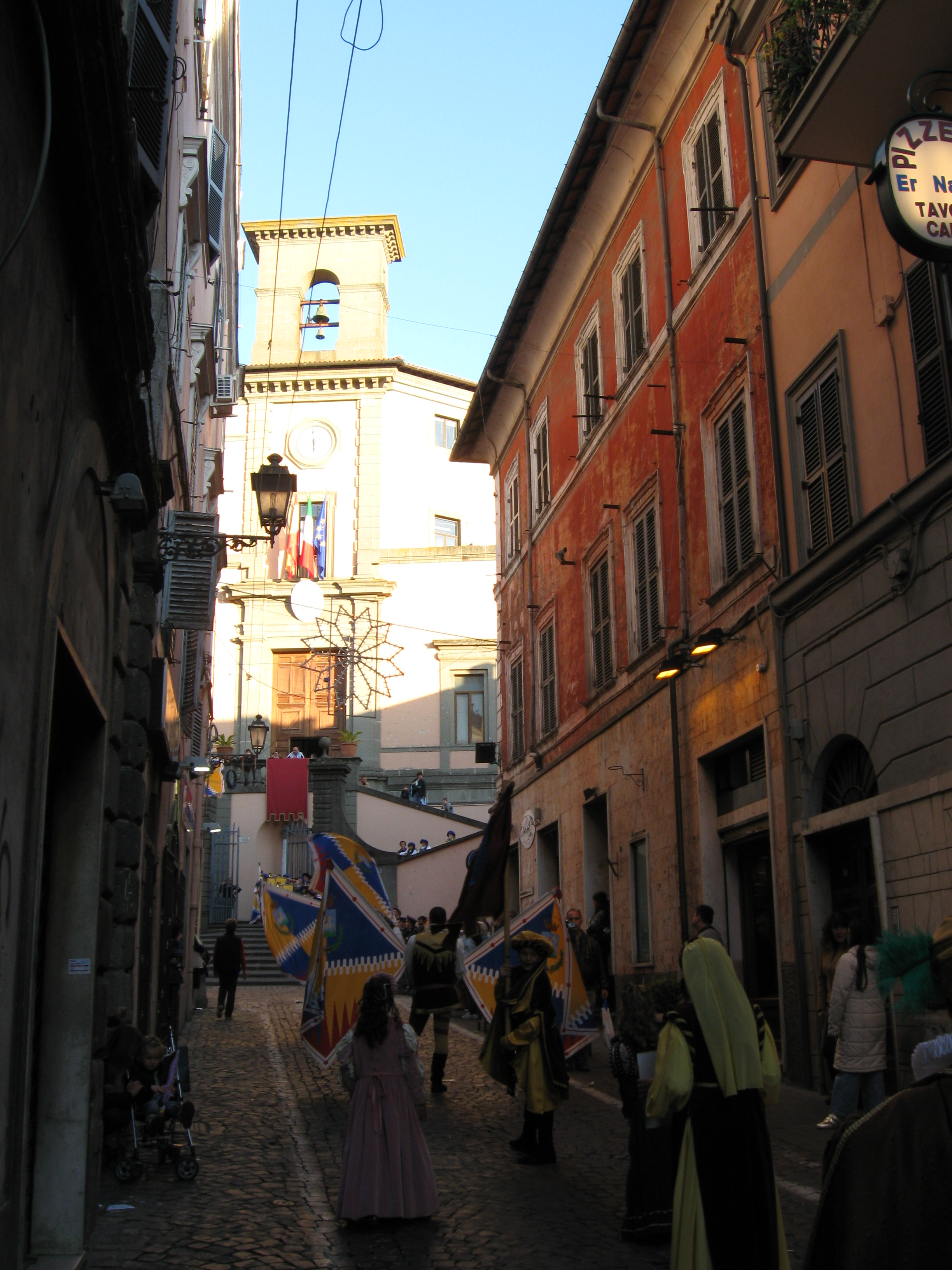 Palazzo Colonna a Marino (RM) visto da via Roma